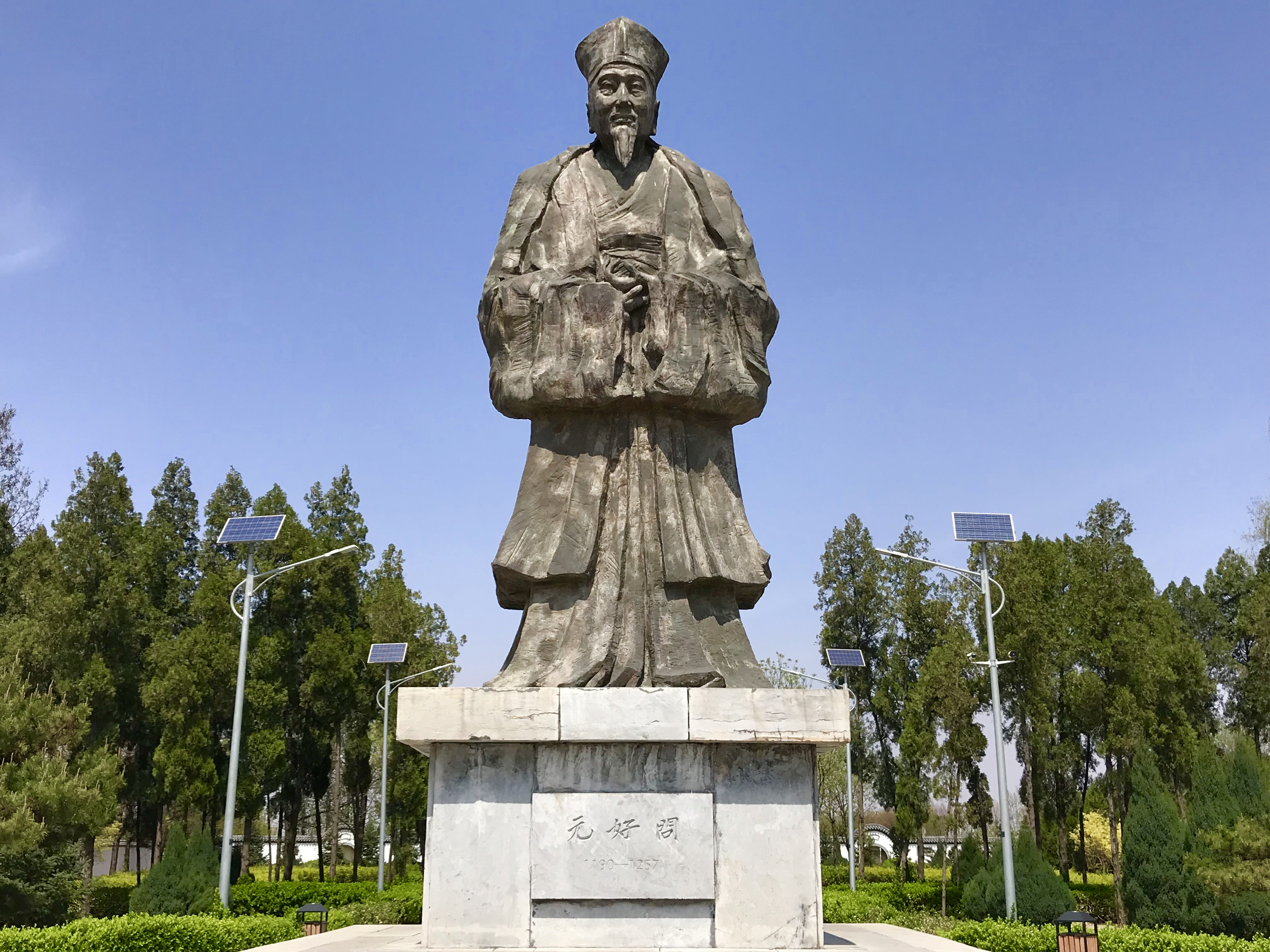 中文（台灣）: 山西省忻州市忻府區韓岩村元好問墓的元好問銅像